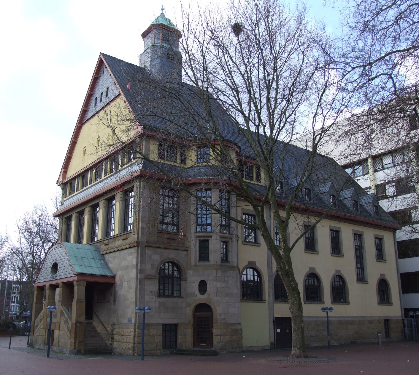 Altes Rathaus in Frechen